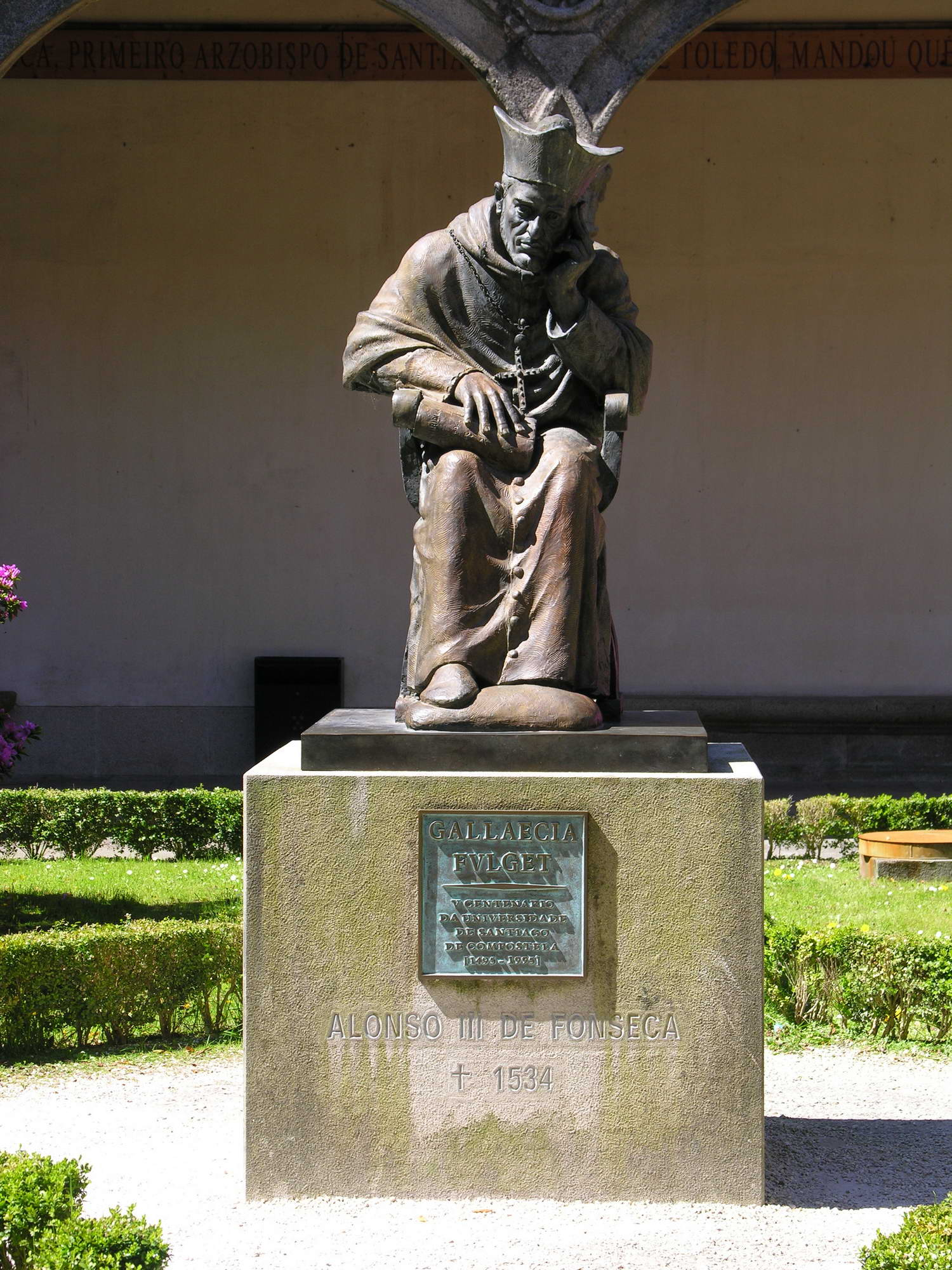 self made.